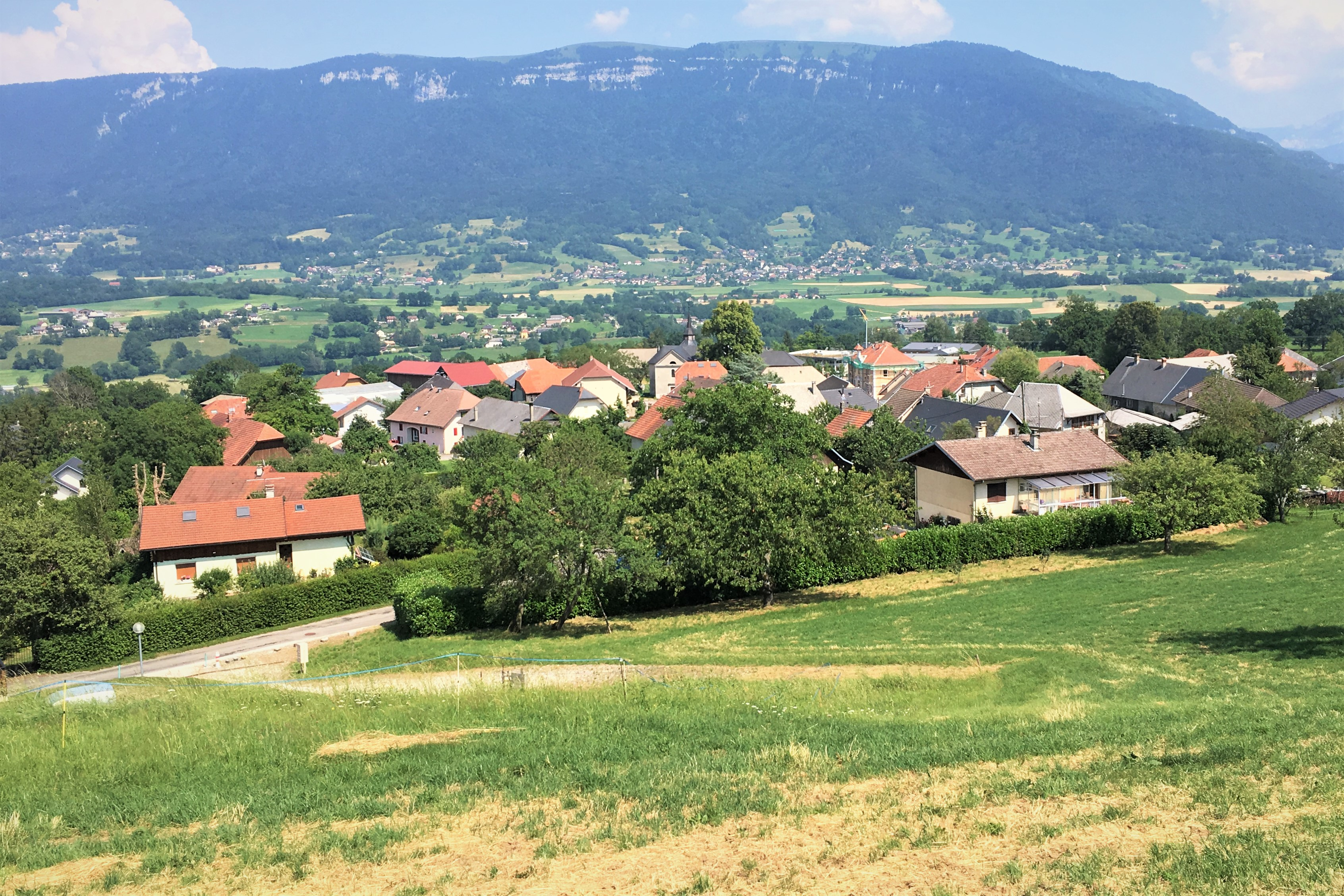 Vue générale de la commune d'Héry-sur-Alby dans la plaine de l'Albanais en Haute-Savoie.